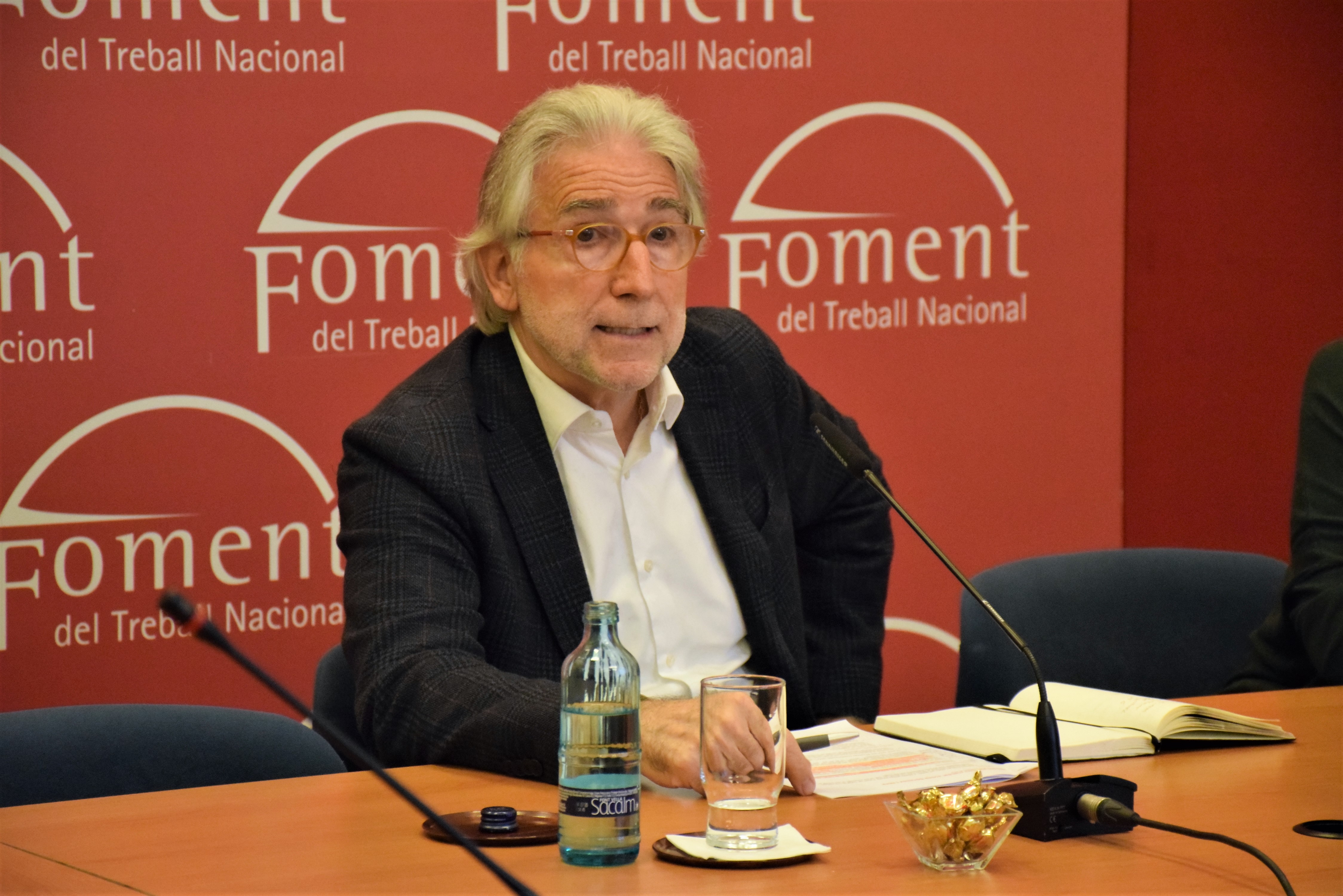 Josep Sánchez Llibre, desde el 5 de noviembre de 2018 Presidente del Foment del Treball